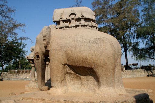 Mahabalipuram temple art